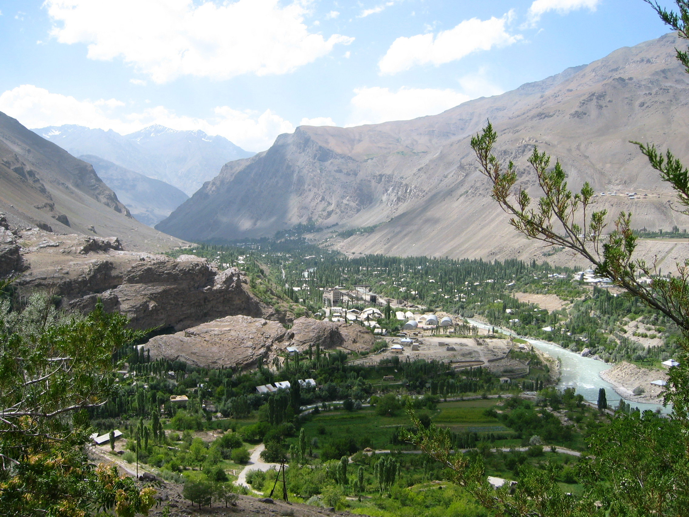 Blick auf Chorog aus dem botanischen Garten der Stadt Fotografiert am 1. August 2004 Alexander Flühmann GNU FDL, Publikation mit Genehmigung des Fotografen